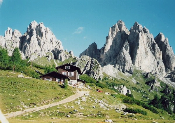 Aussicht vom Rifugio Città di Carpi in der Cadini-Gruppe. Links des Passes Forcella della Neve der Cadin della Neve, rechts des Passes die Cima Eötvös mit dem Campanile Dülfer an der linken Schulter; rechts davon der Cadin di San Lucano (Gemelli), ganz rechts die Cima Cadin di Nord-Est.